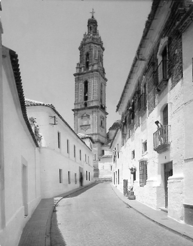 Calle típica de Bujalance (Córdoba)